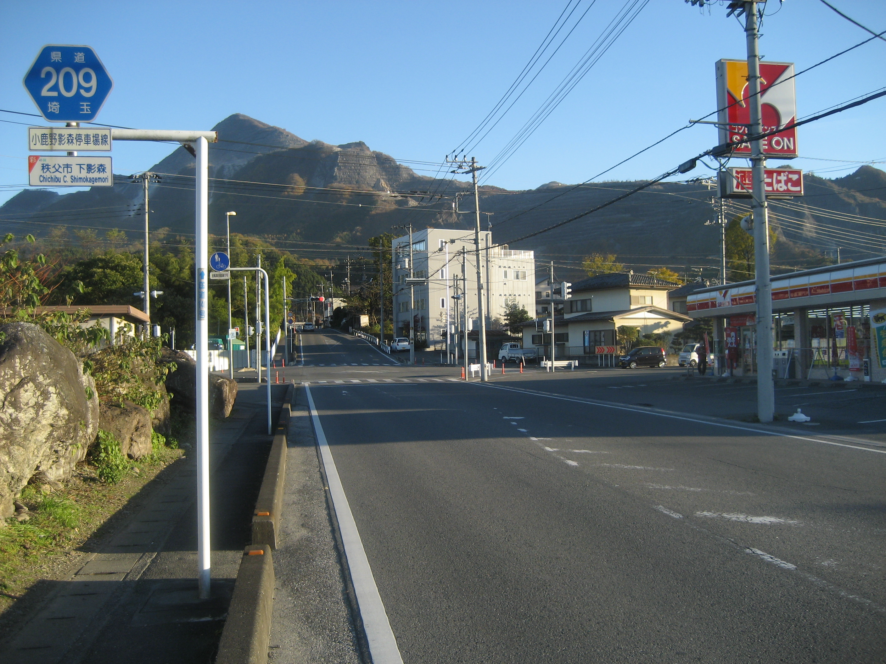 埼玉県道209号線秩父市下影森付近（国道140号線方面を撮影）